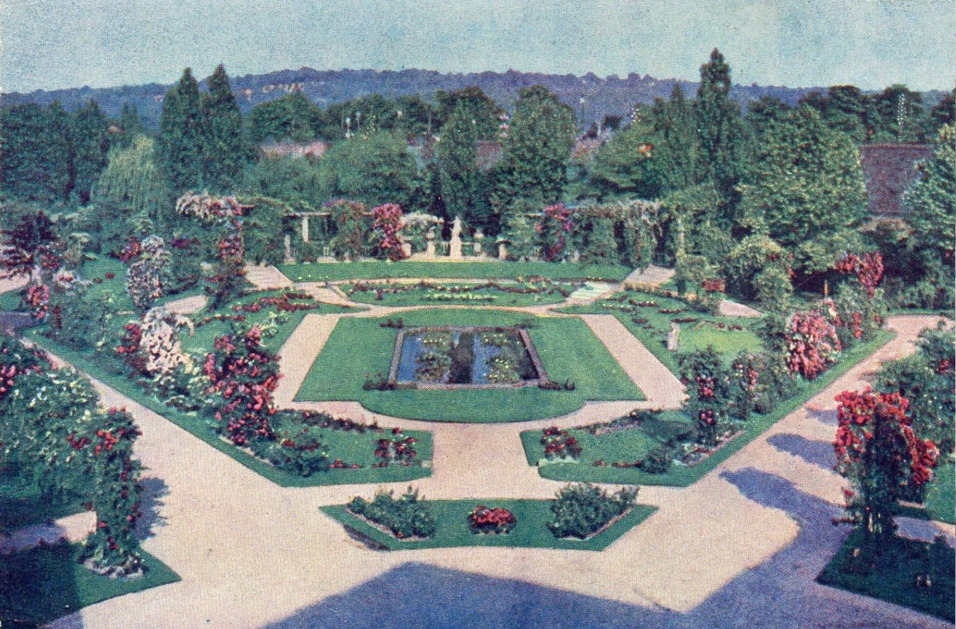 Carte d'invitation à la Roseraie Georges - carte valable du 1er juin au 31 juillet 1921.